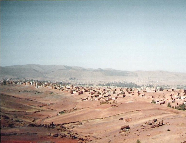 description : Khénifra (Maroc) prise à Taabit auteur : Hadraj Said date : septembre 2005 licence : GFDL